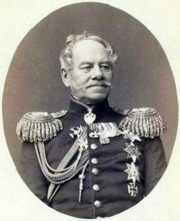 Мейендорф, Егор Фёдорович